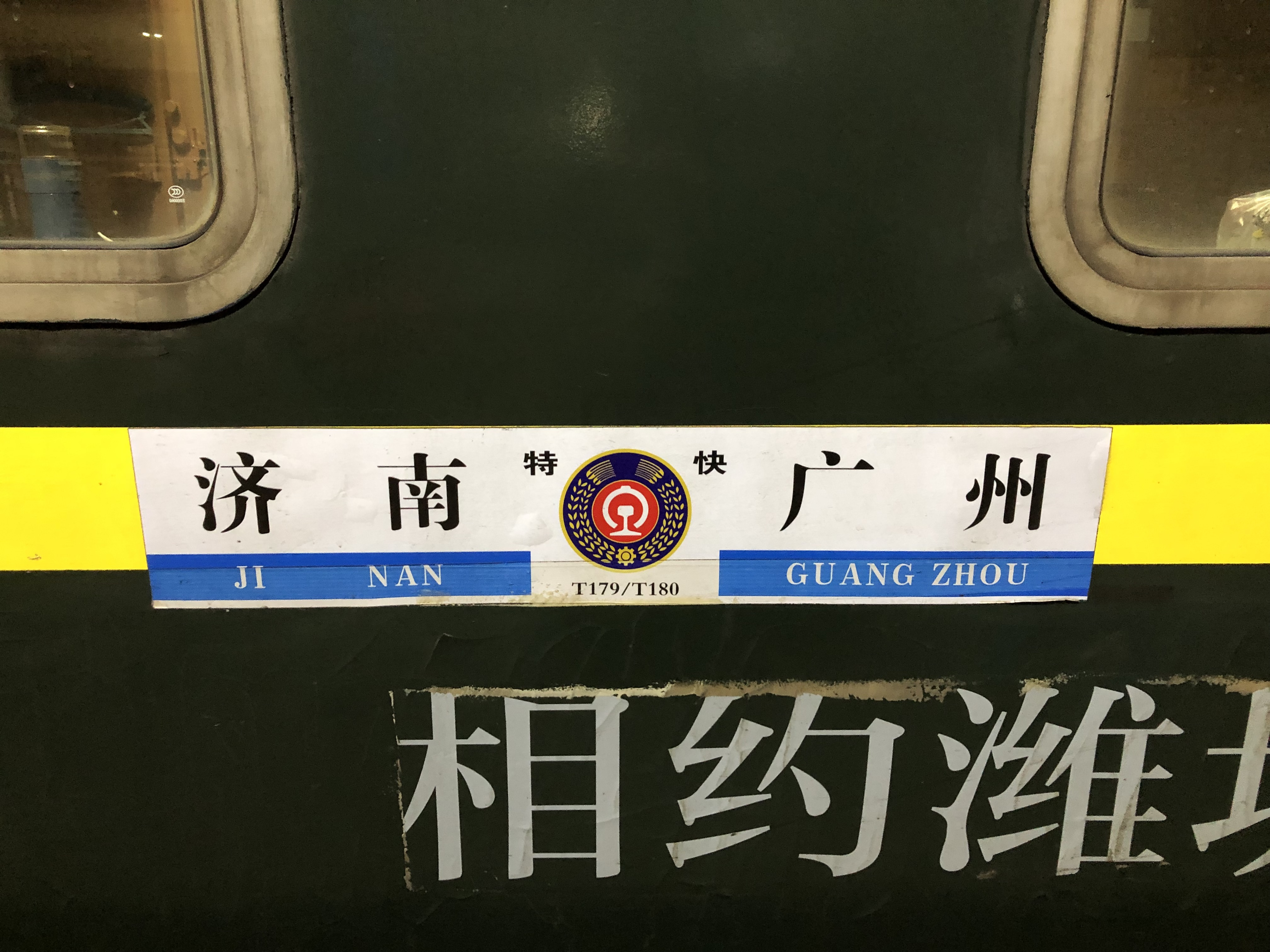 T179/180次列车的水牌，摄于广州站。